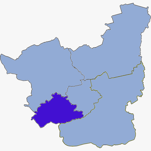 Powiat strzelecko-drezdenecki - Gmina Zwierzyn